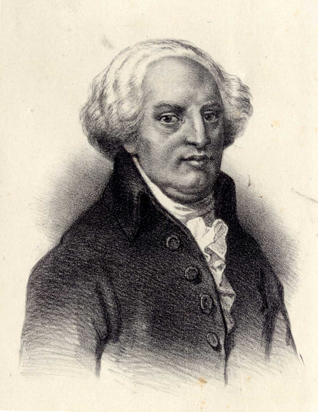 Cornelis Johan de Lange, heer van Wijngaarden en Ruigbroek, regent en geschiedschrijver te Gouda